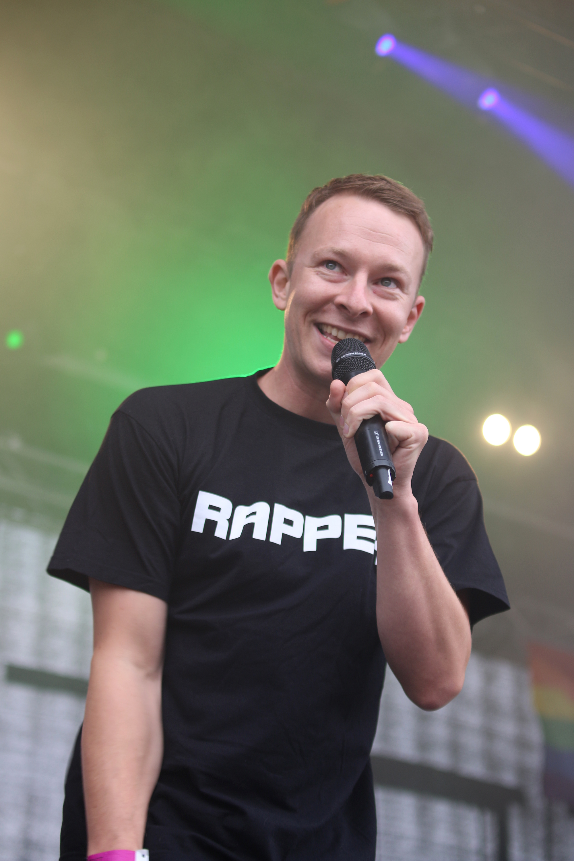 Folklore 014 in Wiesbaden: Deine Freunde